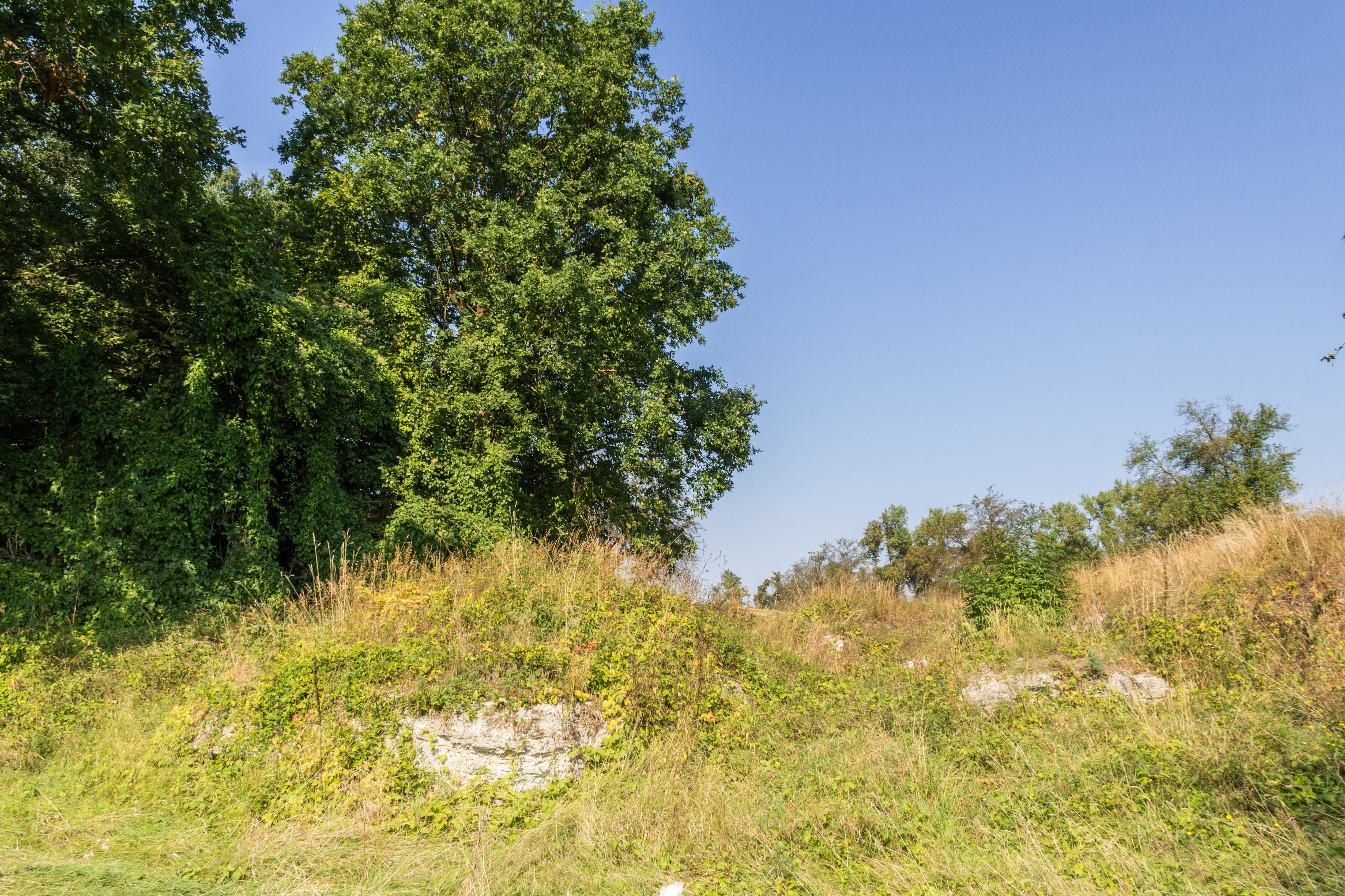 Sulzheimer Gipshügel, Naturschutzgebiet, Geotop, Sulzheim in Unterfranken